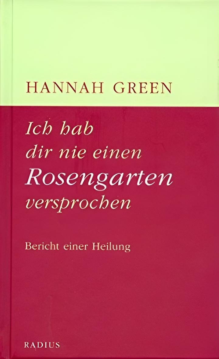 Hannah Green: Ich hab dir nie einen Rosengarten versprochen. Radius, 3. Auflage, Stuttgart 2012, ISBN 978-3871739316.